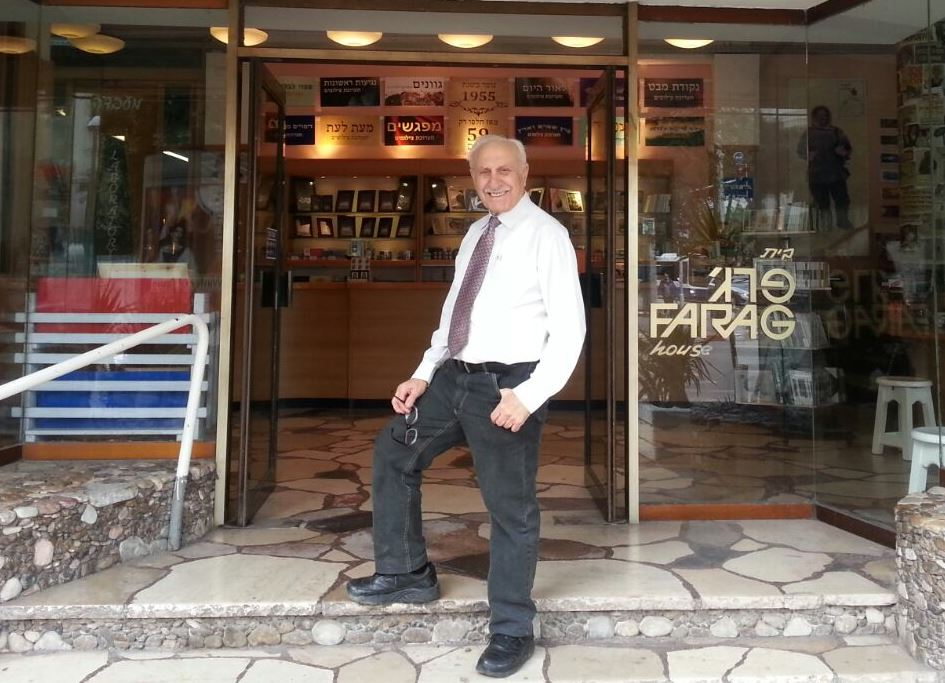 פרג' פרי, צלם ישראלי, מייסד פוטו פרג'-פרג' אולפני צילום